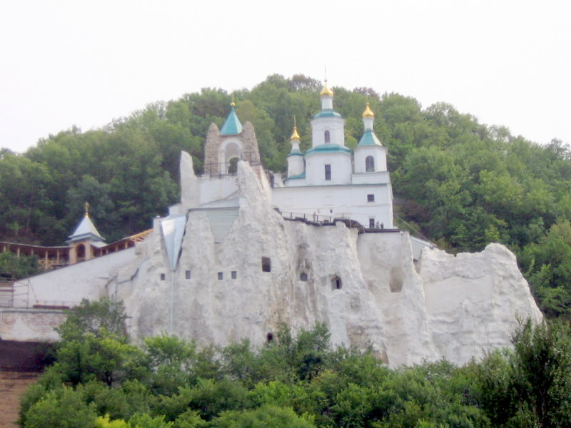 Svyatogirs'kaya Lavra 21.jpg